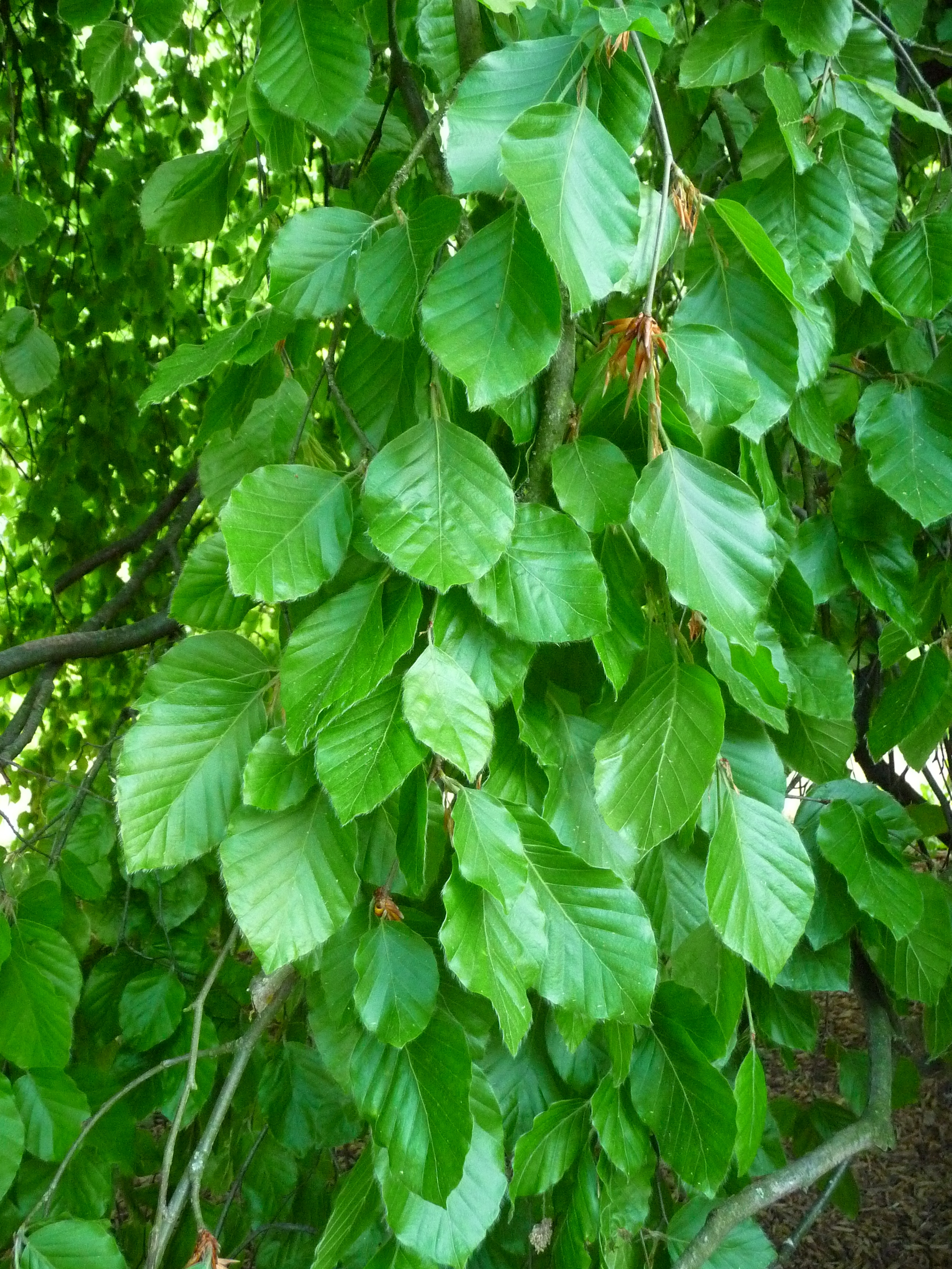 Detailaufnahme von Blättern einer Hängebuche (Fagus sylvatica f. pendula)